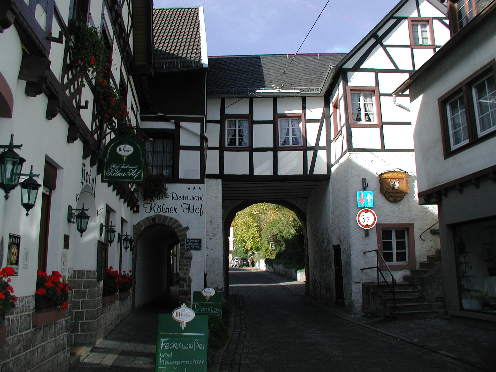 Blankenheim - Ahr